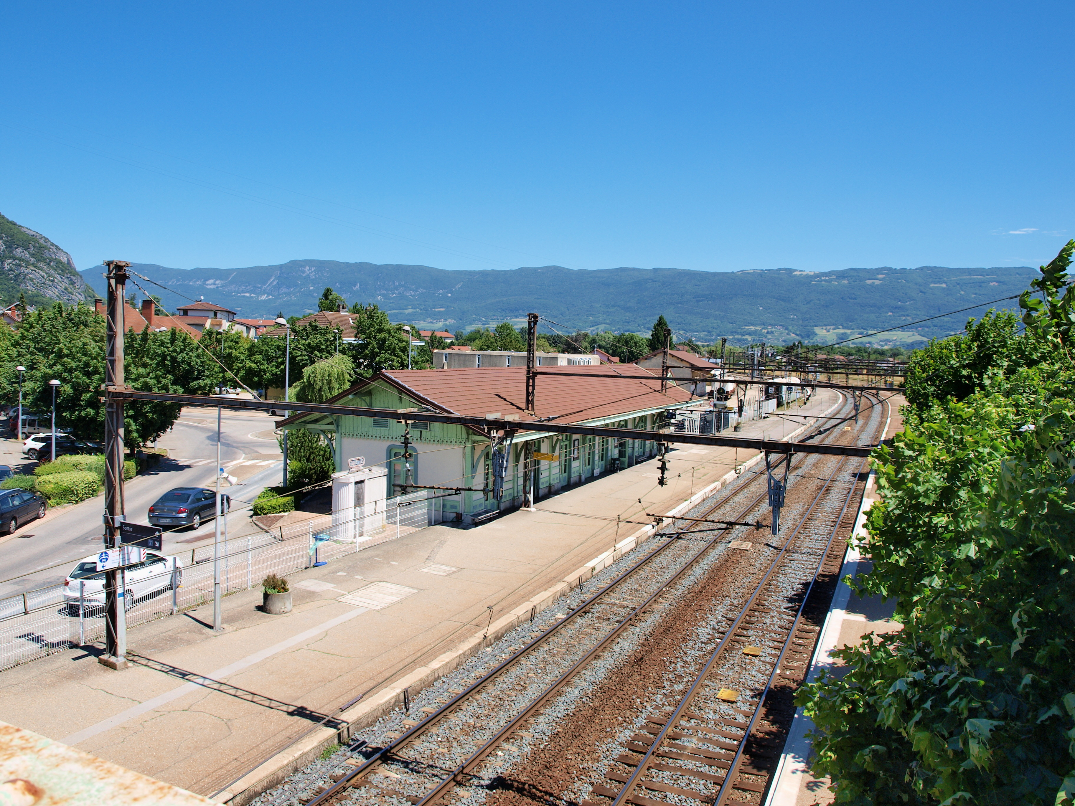 Gare de Culoz (Ain, France)